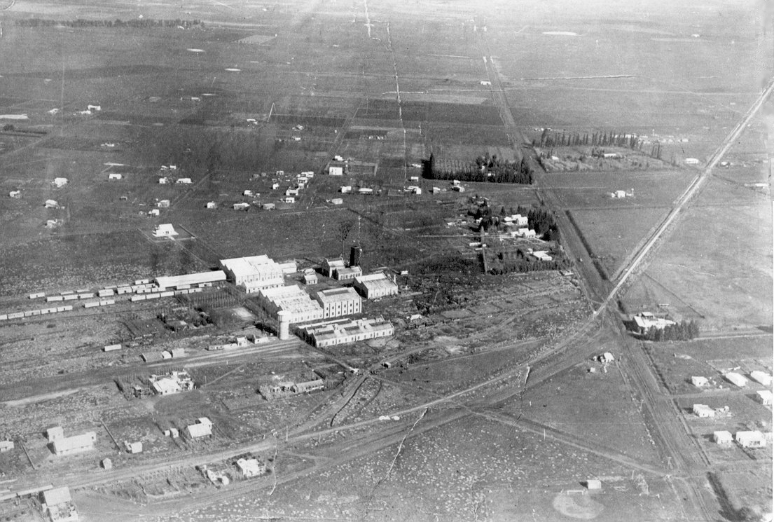 Talleres del Ferrocarril Midland, Libertad, Merlo, c. 1920.